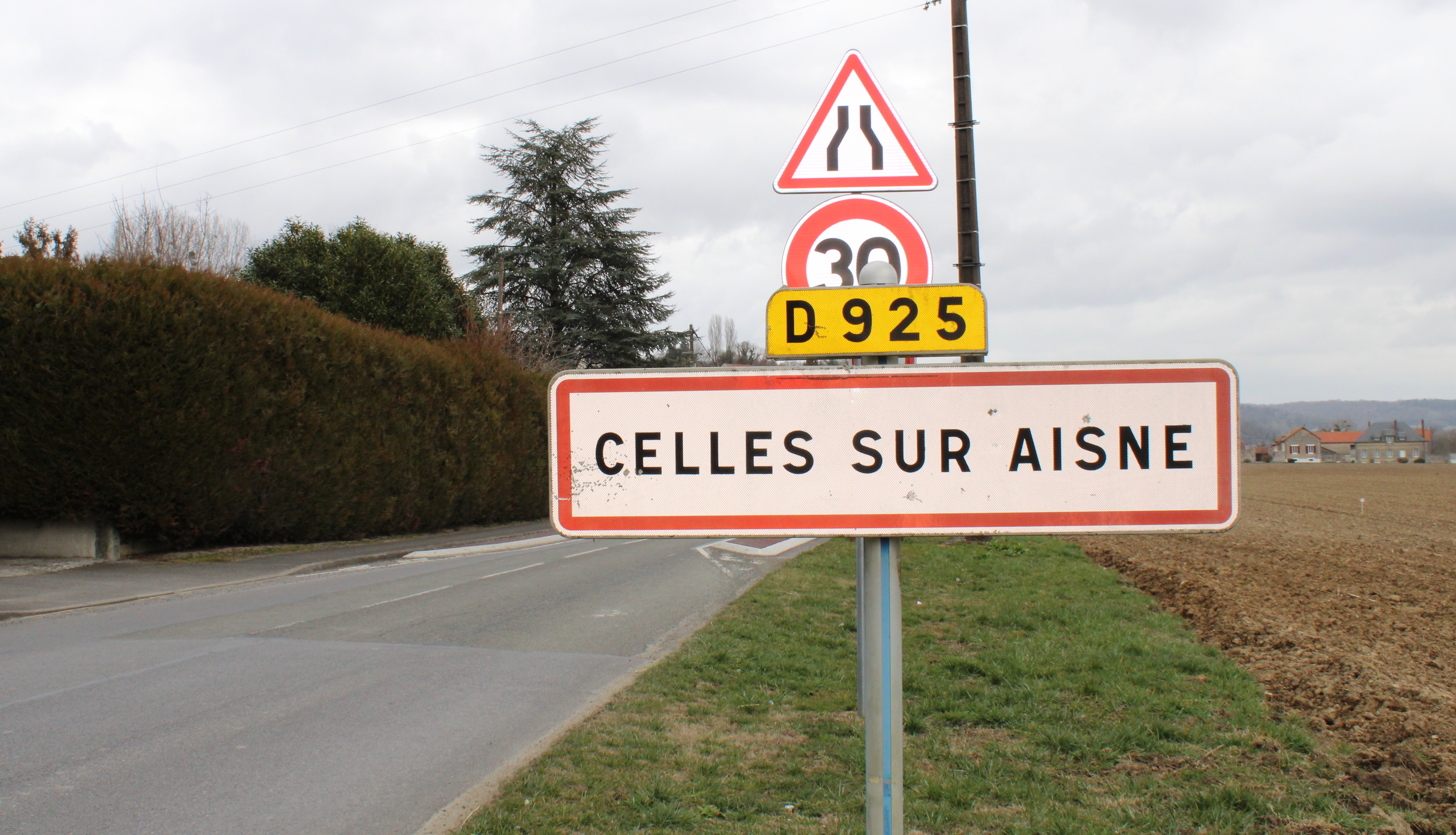 Entrée du village